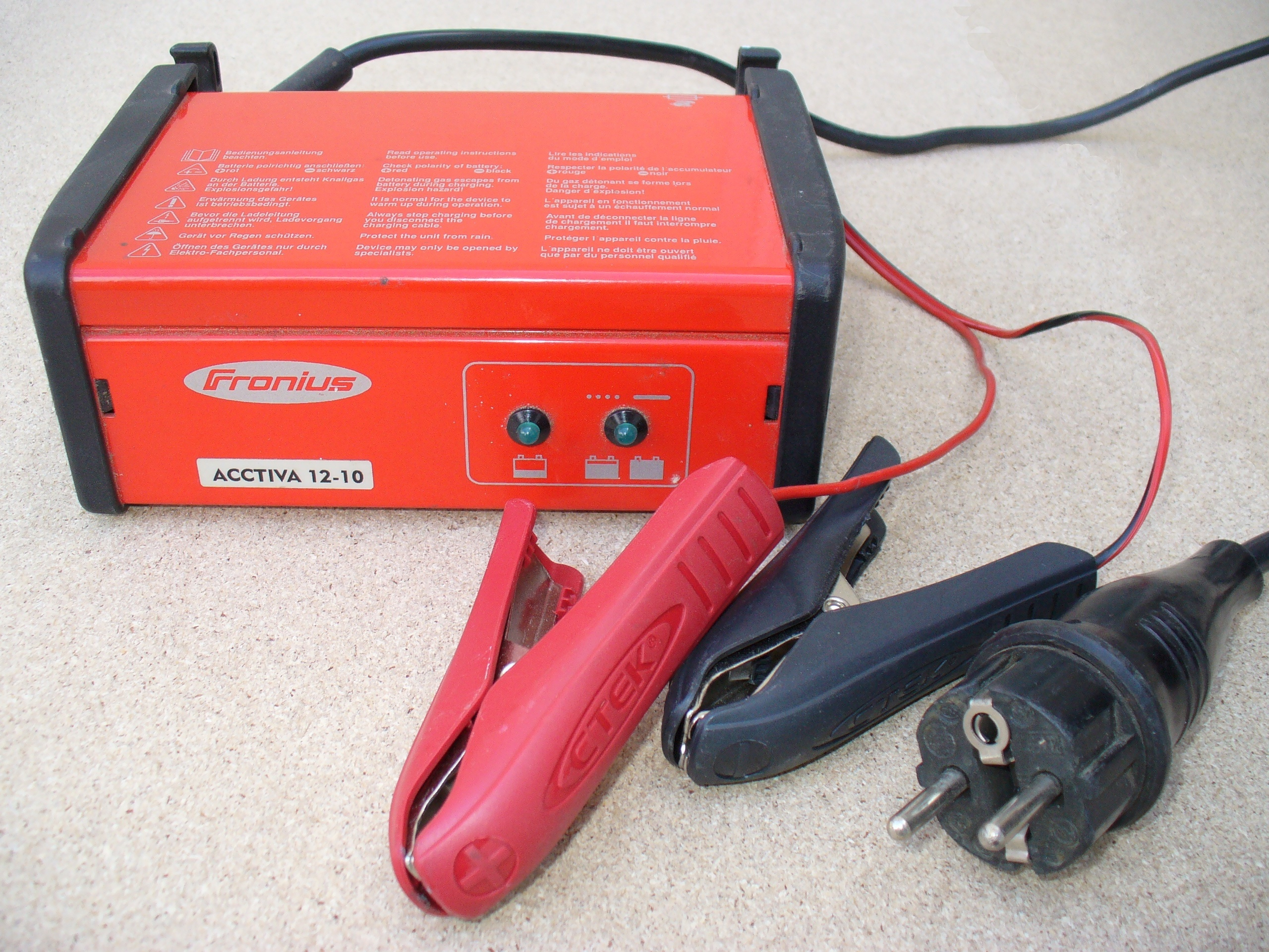 Fronius Activa 12-10 Ladegerät in effizienter Schaltnetzteilbauweise (ohne Transformator) für Haushaltstrom 230V für Bleiakkumulatoren 12V und mit einem Ladestrom von 10A